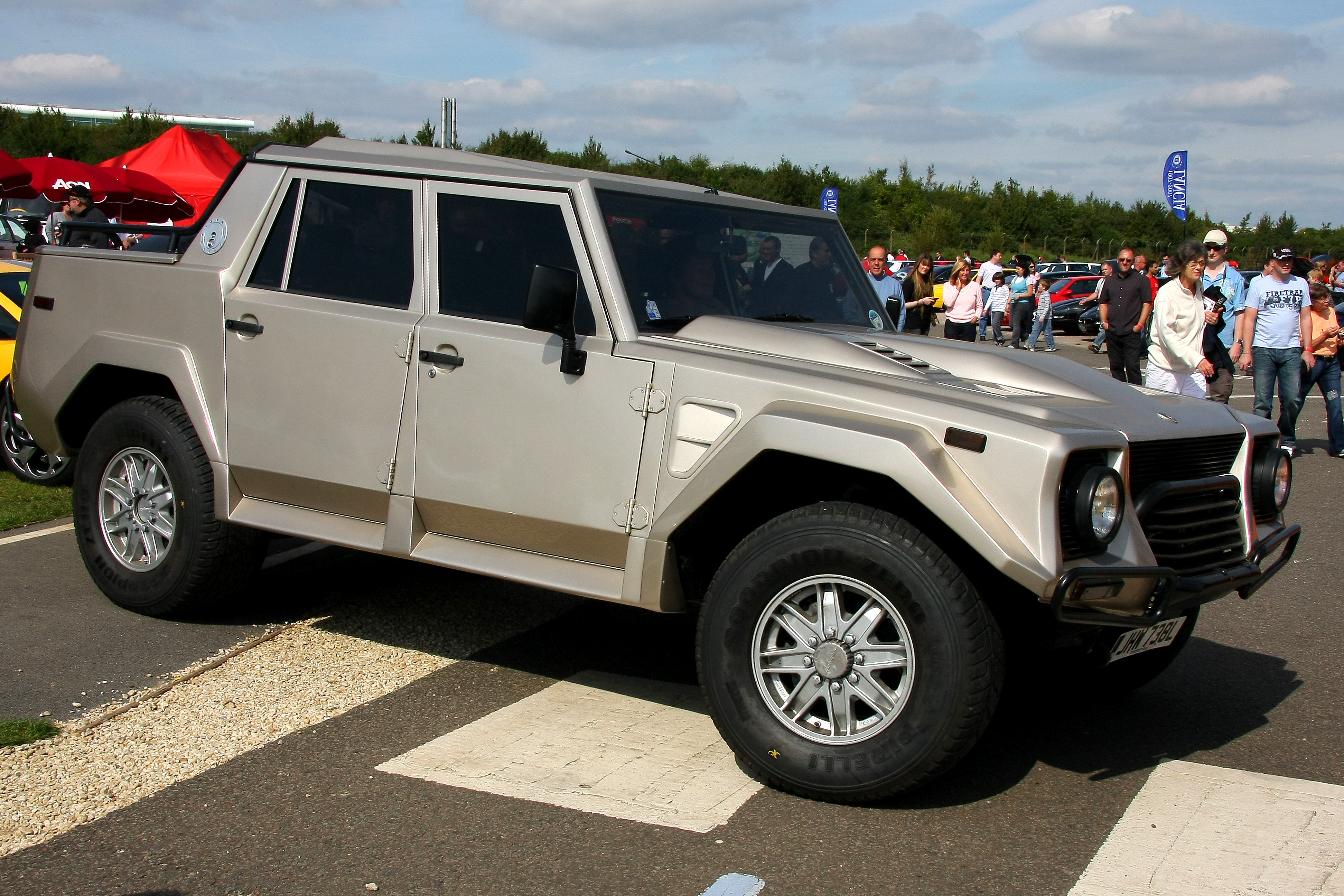 1991 Lamborghini LM 002 (5.2 litres)